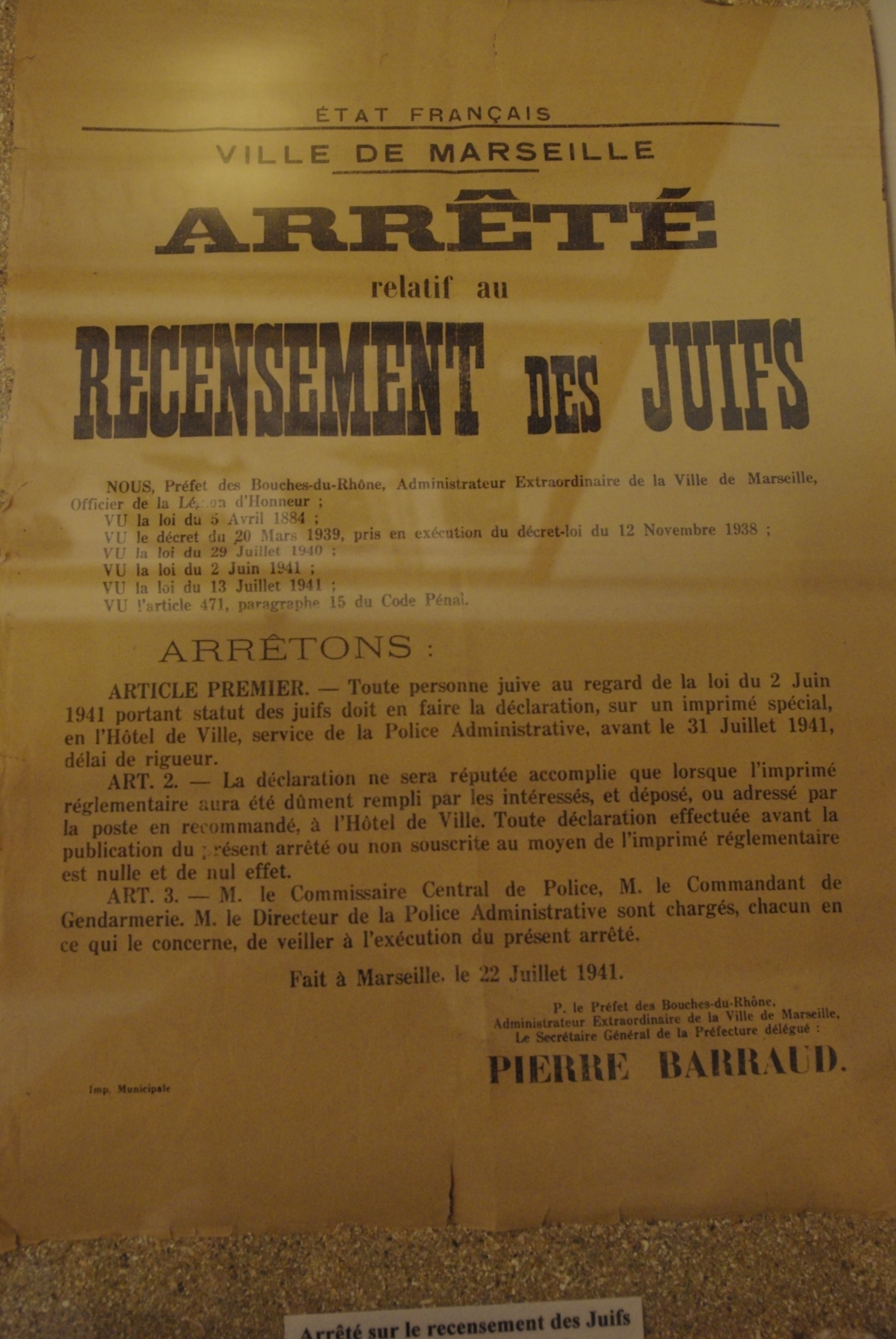 Affiche posée à Marseille en zone libre annonçant le recensement des Juifs (1941) - Musée de la liberté retrouvée à Quinéville (Manche)